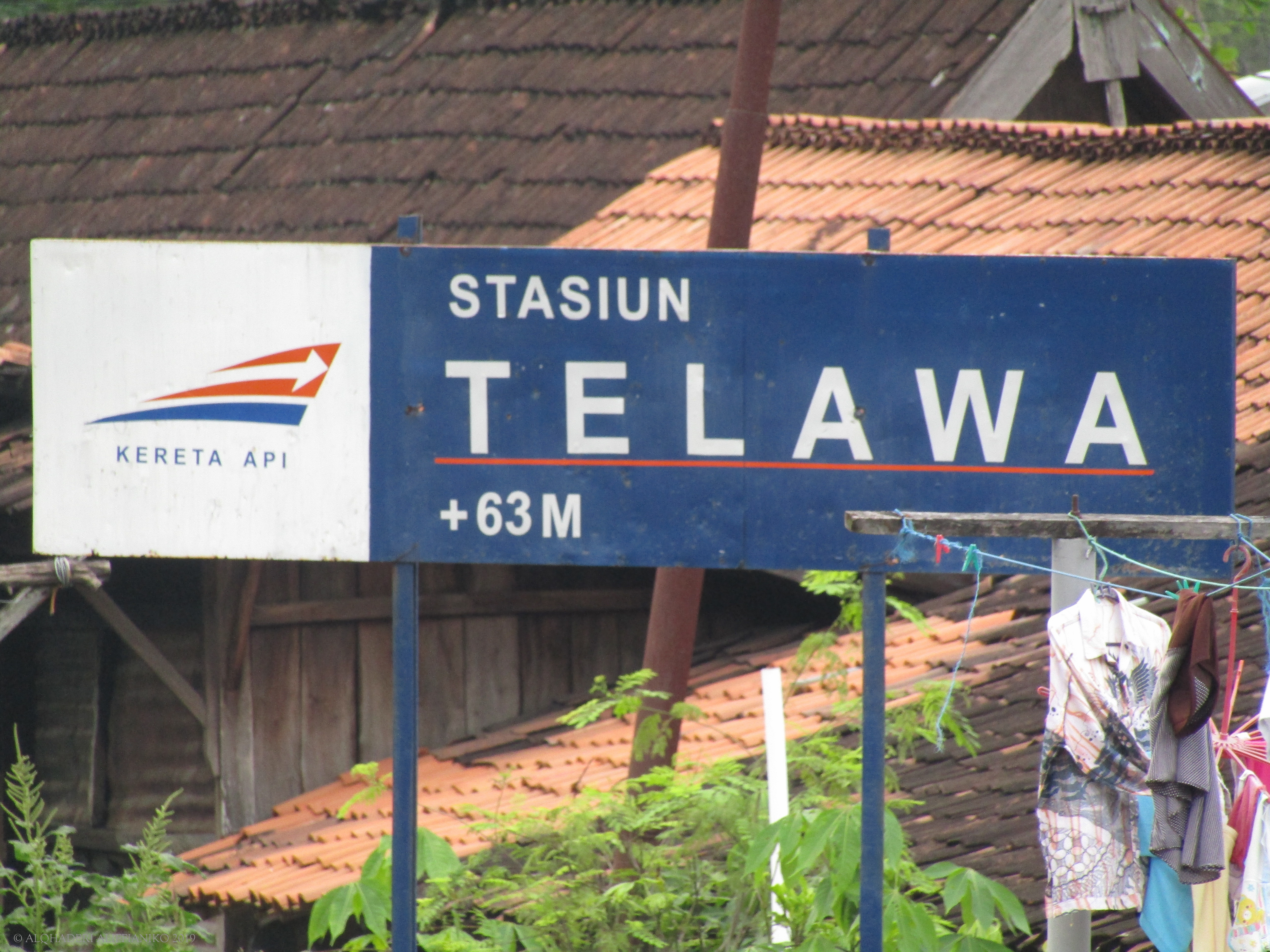 Papan nama stasiun Telawa versi 2017